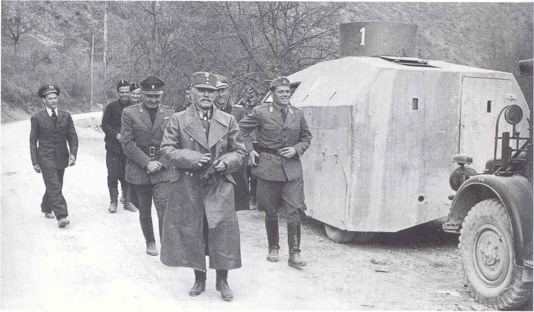 Vilko Begić, Ivica Frković, Rafael Boban i pratnja u okolici Donjeg Vakufa, proljeće 1943.